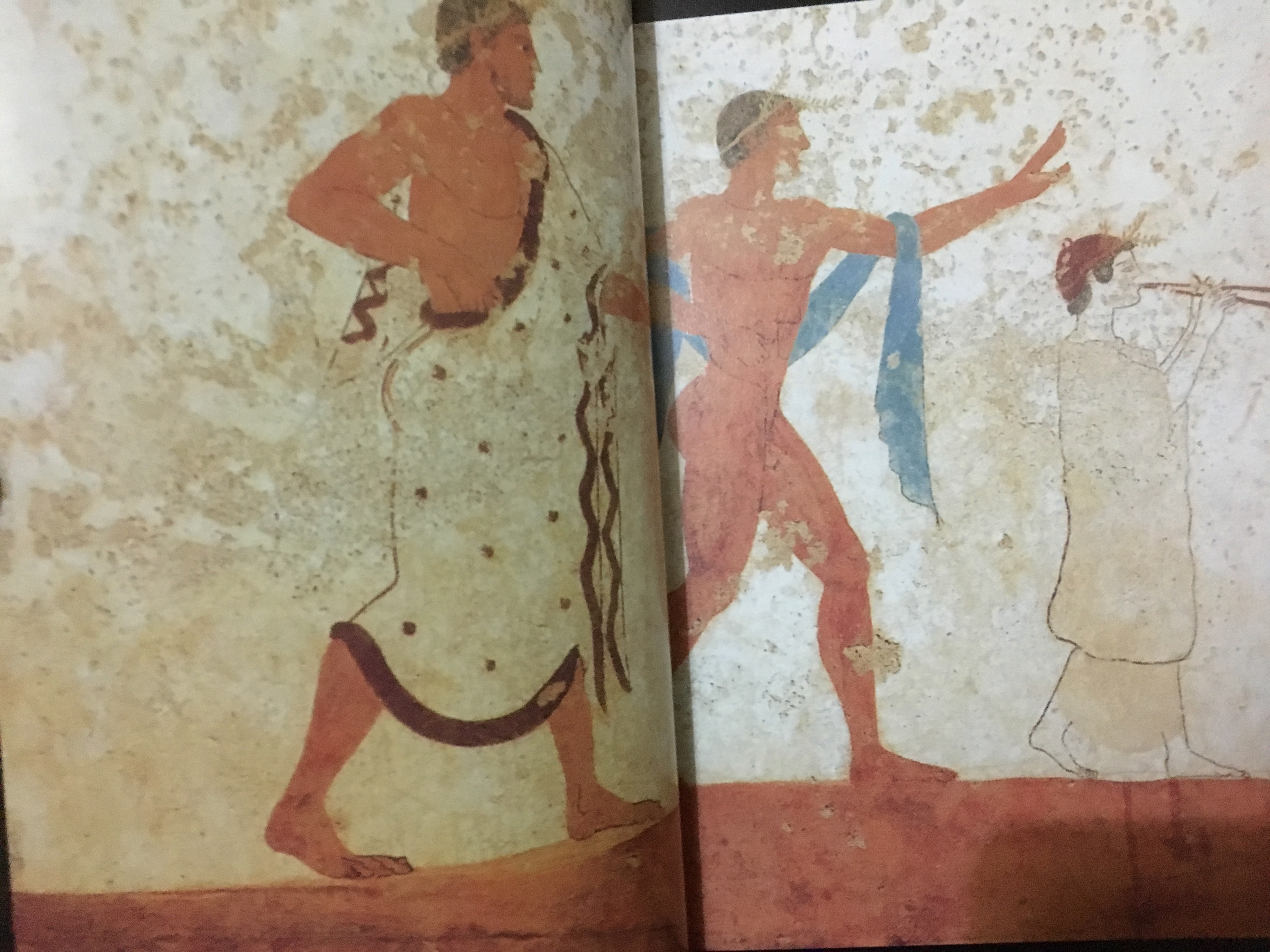 Poseidonia, Tempa del Prete, tombeau du plongeur, paroi ouest. — Ouverture de Magna Grecia : Les colonies grecques dans l’Italie antique par Pier Giovanni Guzzo, collection « Découvertes Gallimard / Histoire » (n° 324), description à la page 120. Éditions Gallimard, 1997.